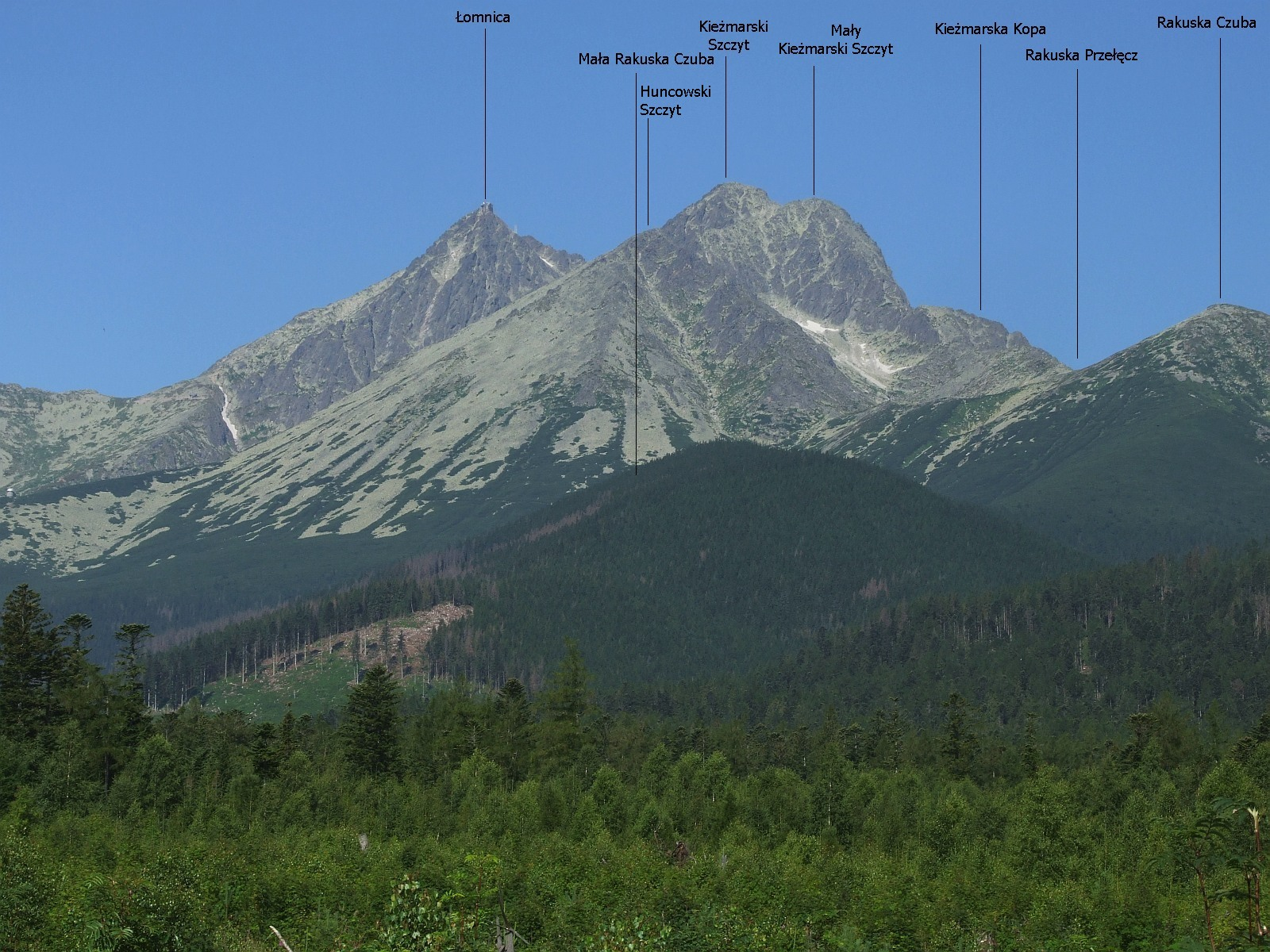 Grupa Łomnicy (Tatry Wysokie). Widok z Drogi Wolności (wejście do Doliny Kieżmarskiej)